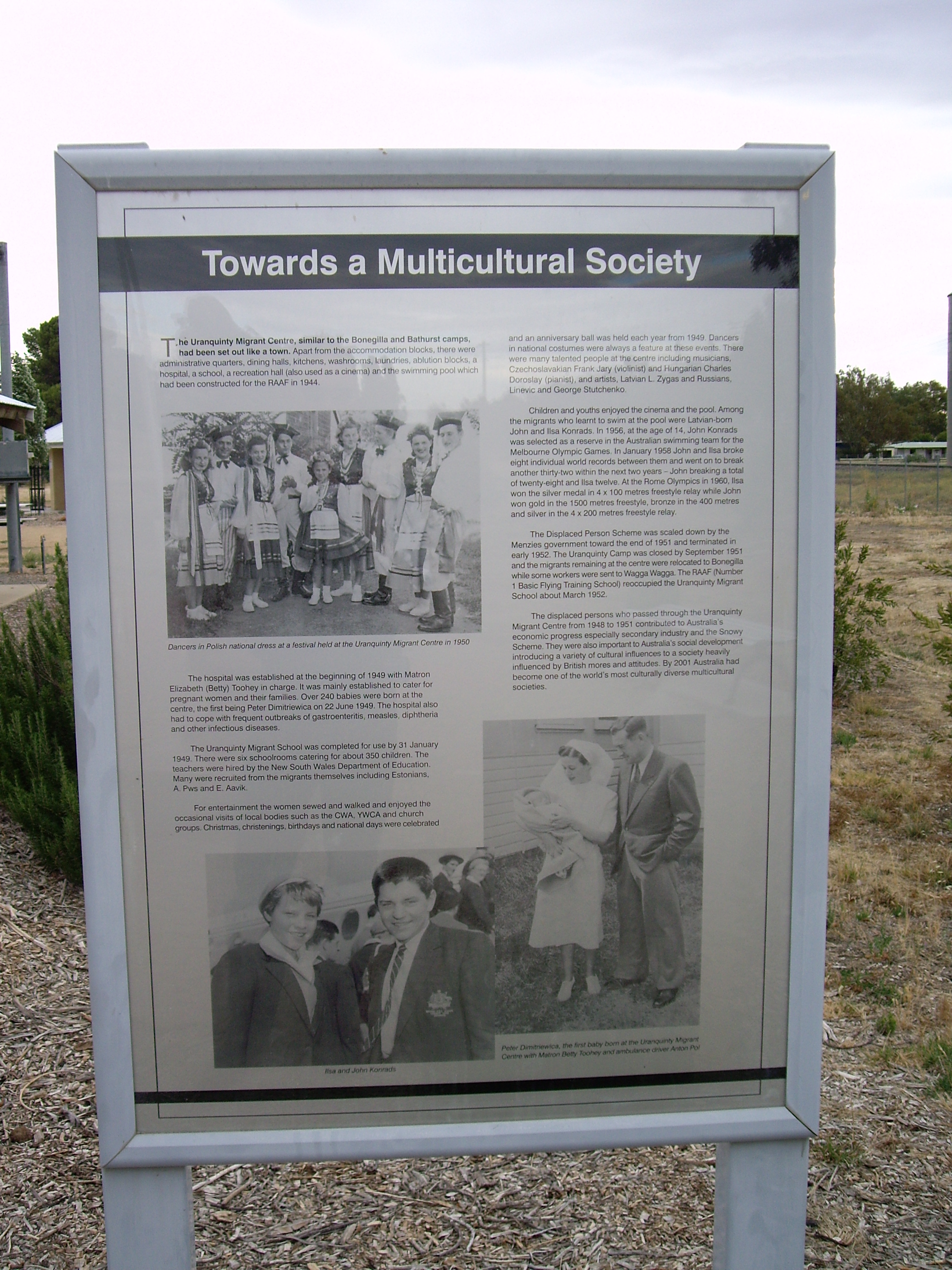 John & Ilsa Konrads - Uranquinty Public Memorial